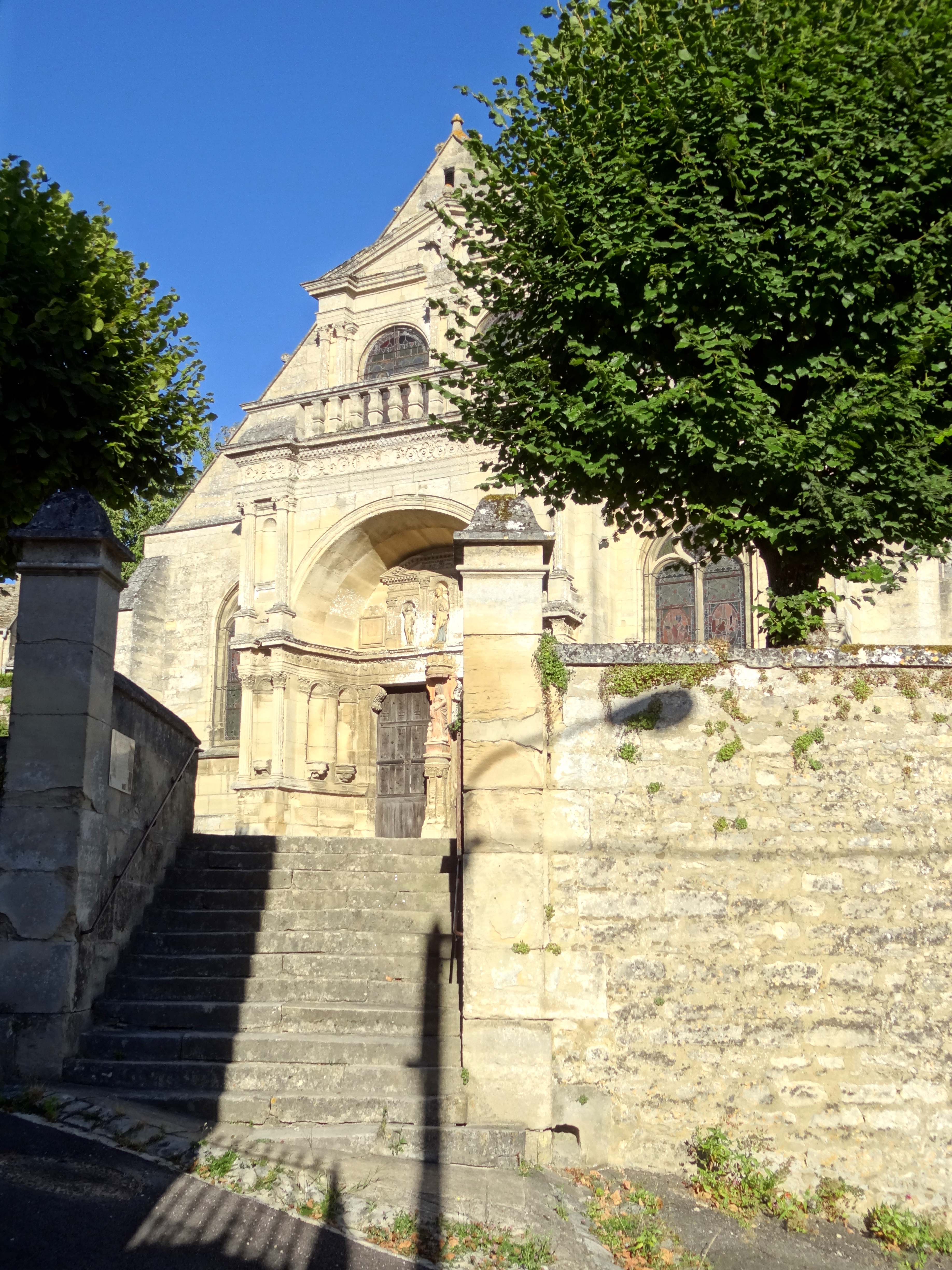 Église Saint-Gervais-et-Saint-Protais de Saint-Gervais - voir titre.